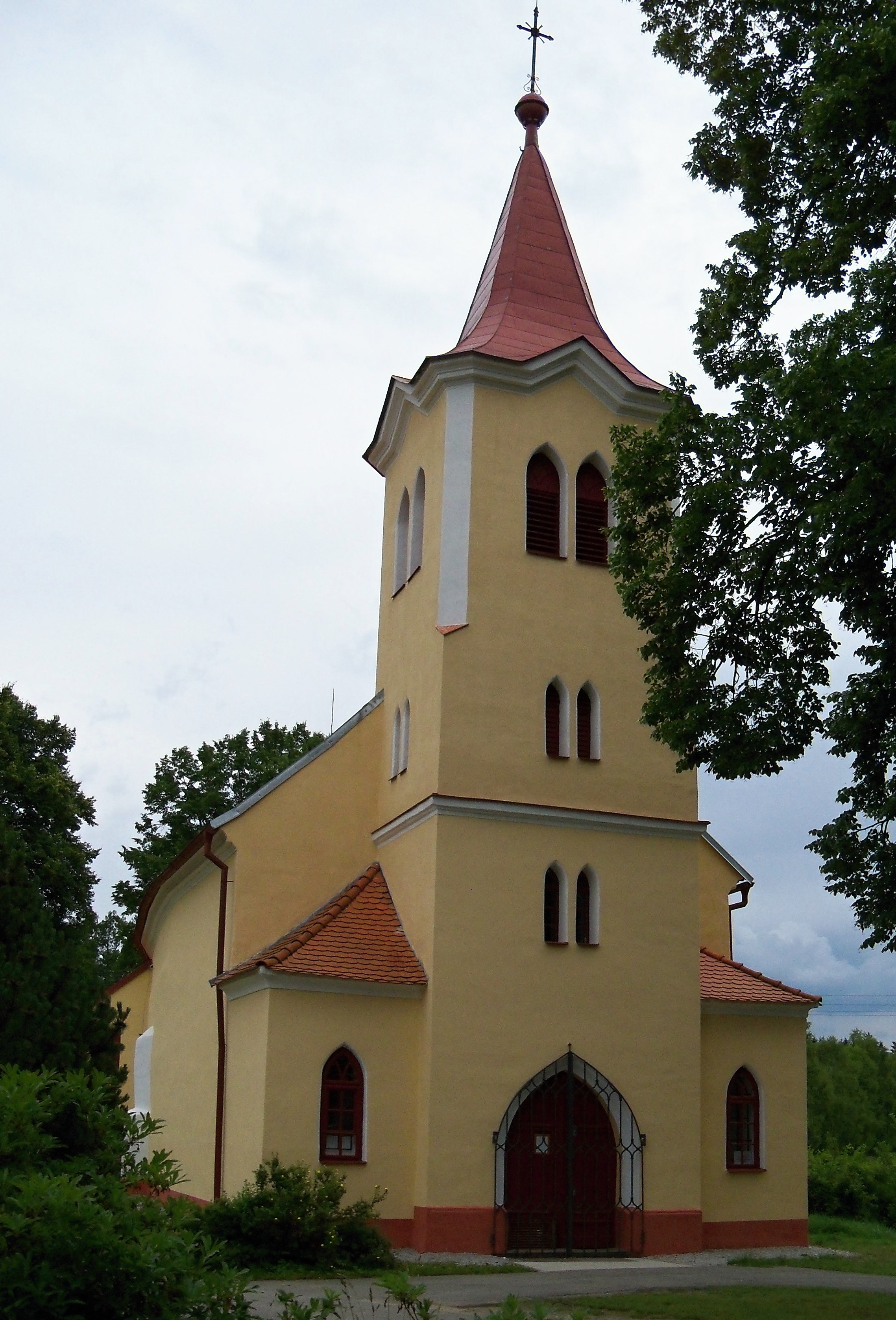 Kostel sv. Maří Magdalény (Majdalena), V od středu obce, u školy, Majdalena